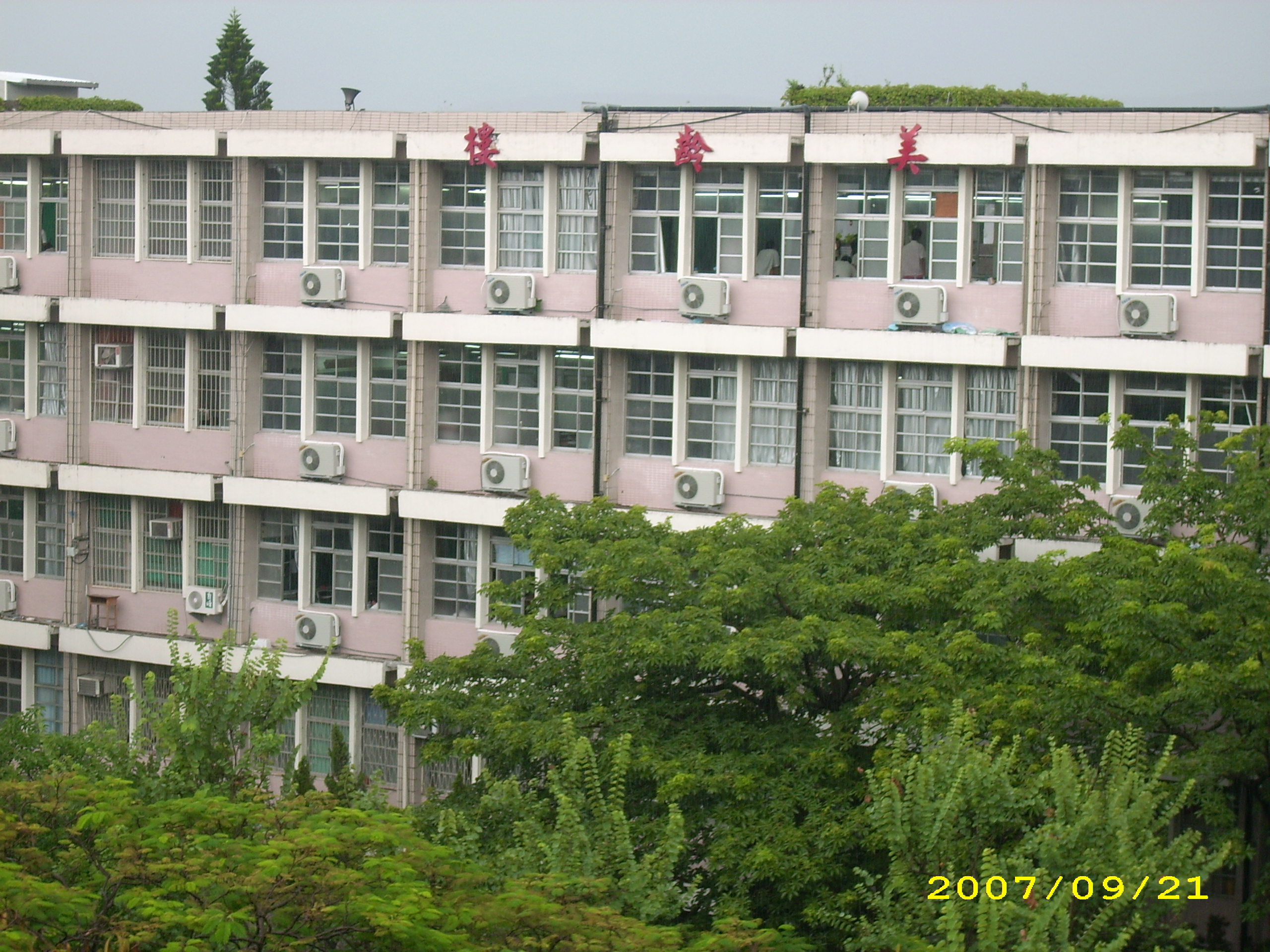 臺北市中正高中美齡樓（背面）。